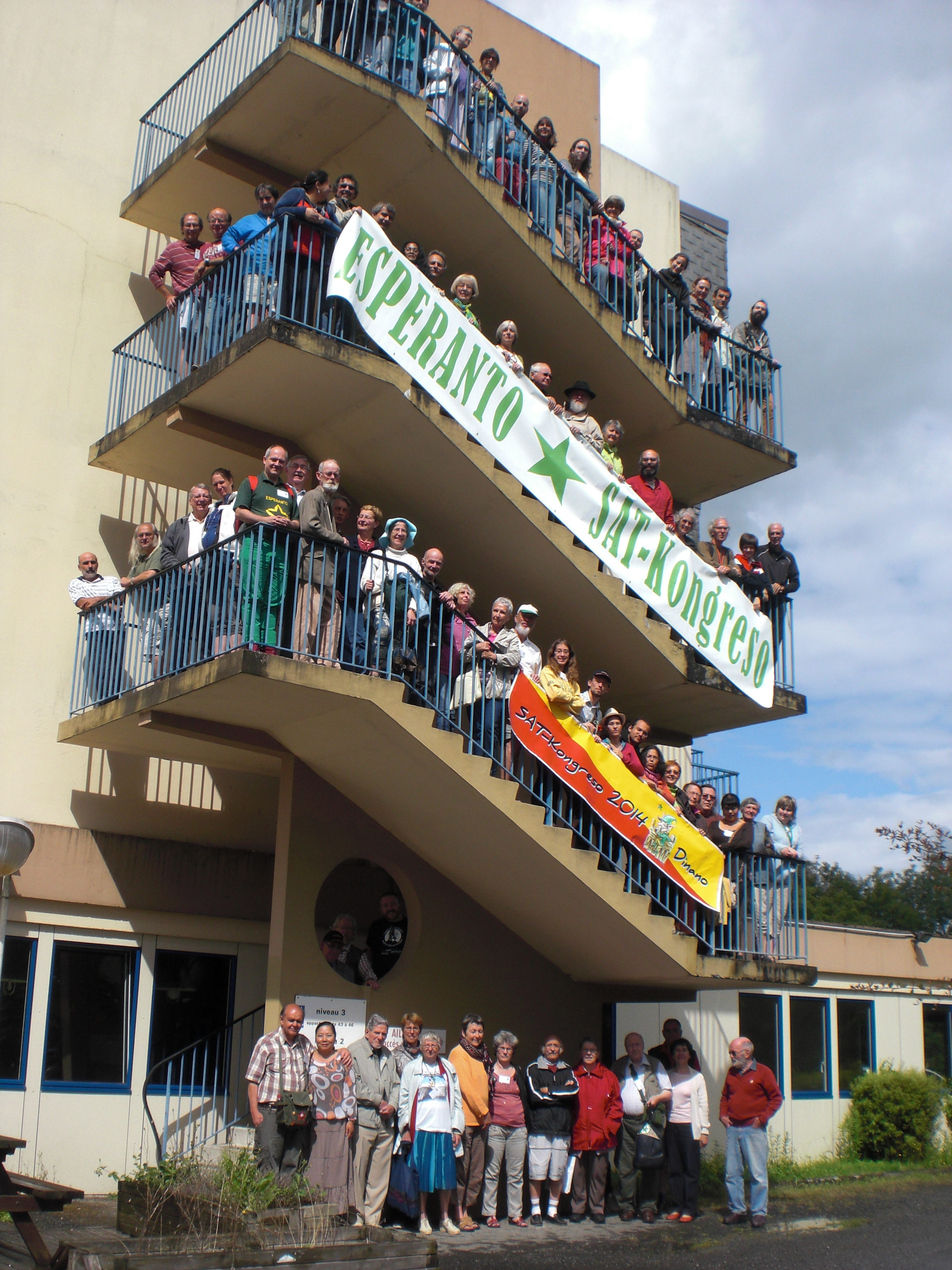 Grupa foto de SAT-kongreso 2014.